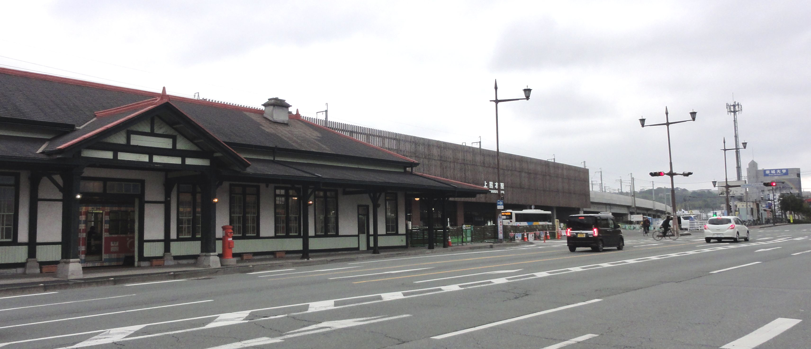 上熊本駅